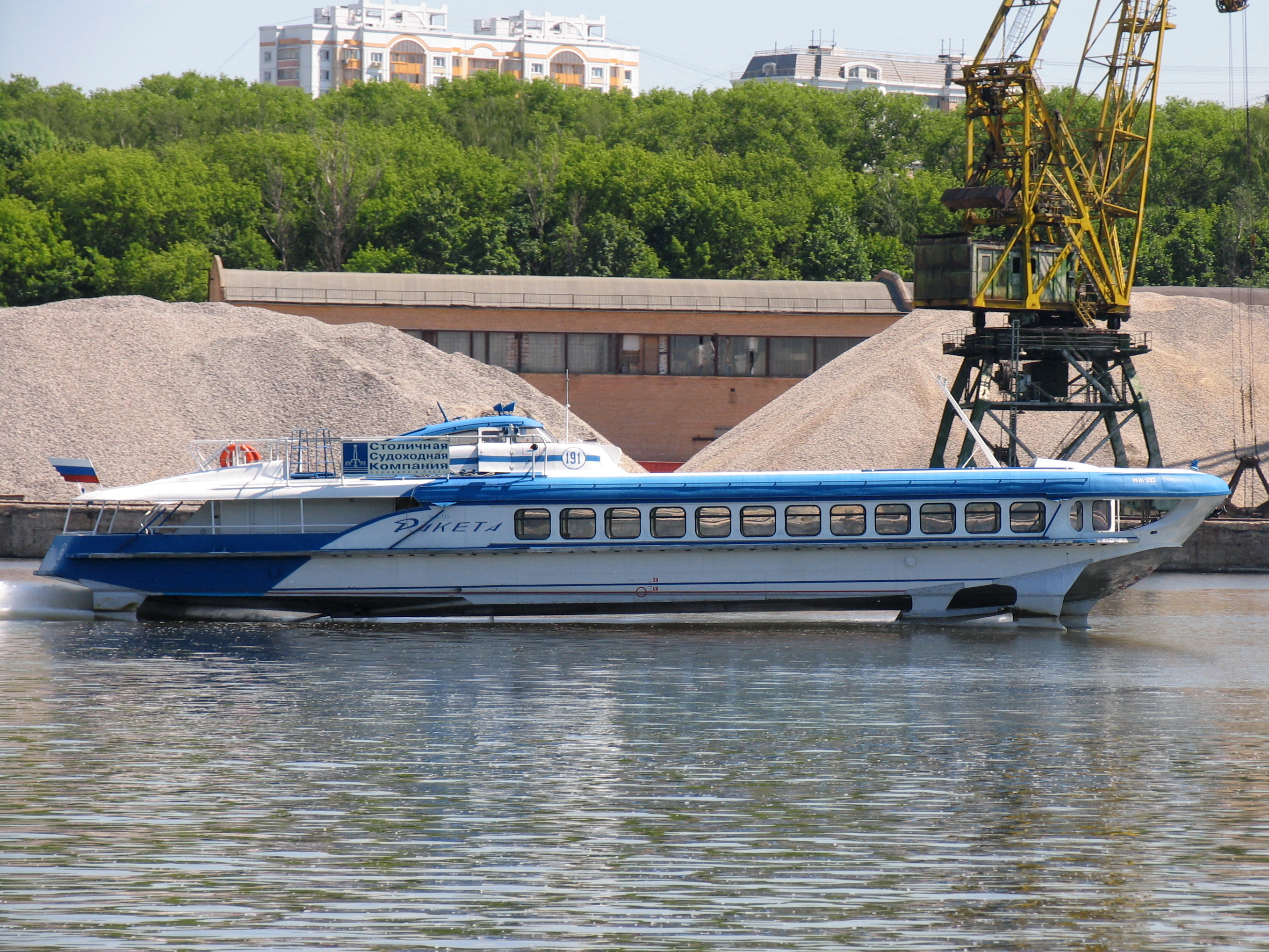 Судно на подводных крыльях "Ракета-191" (бывшая "Ракета-244") на Химкинском водохранилище.